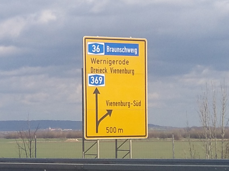 Beschilderung an der Bundesautobahn 369, 25. Februar 2020.